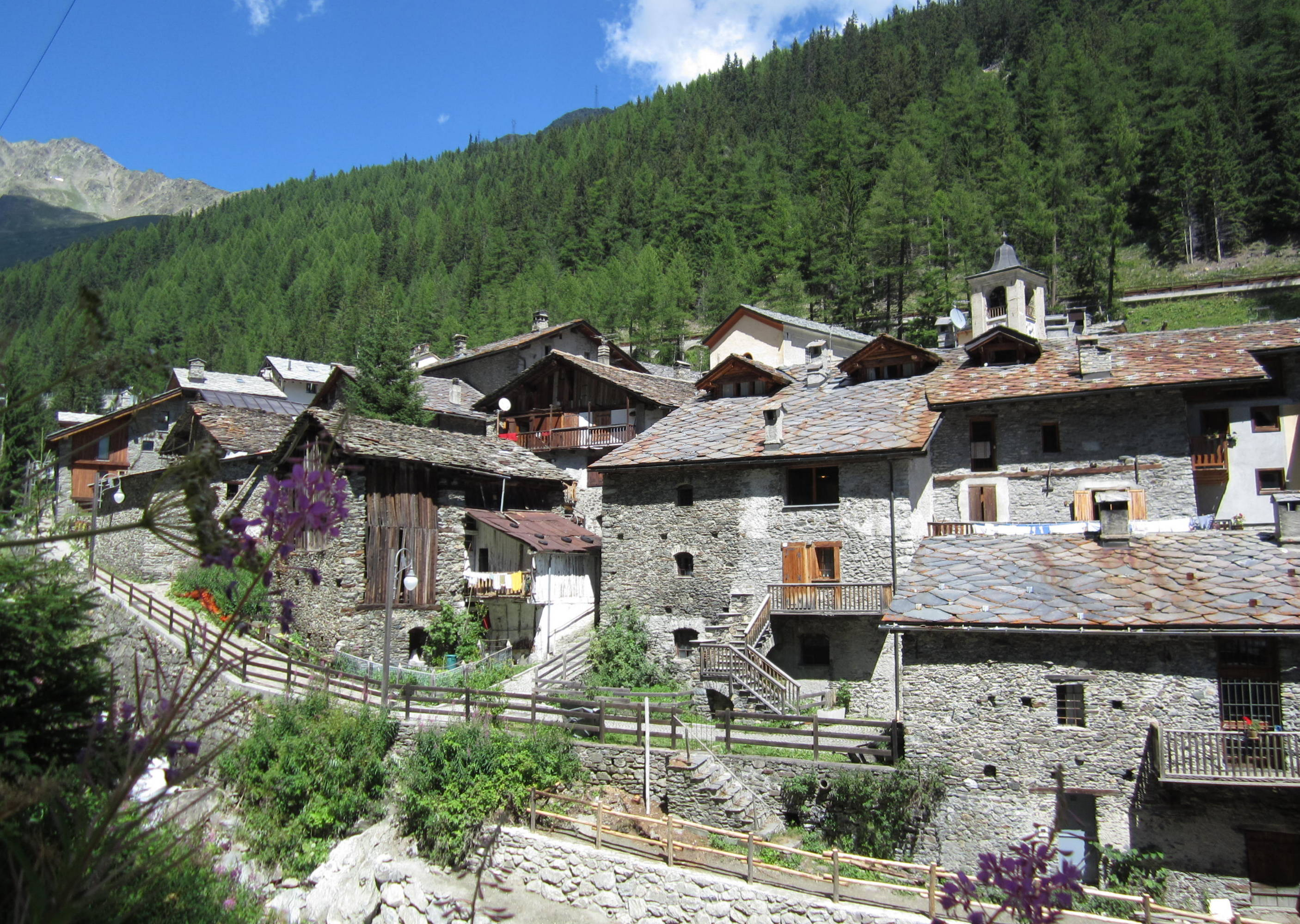 Panorama di Saint-Rhémy